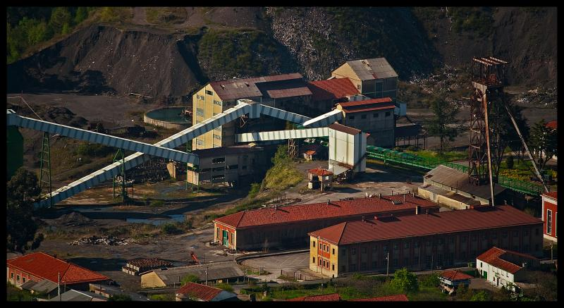 Vista parcial de las instalaciones de exterior de Mina La Camocha, Gijón, España, desde el Picu'l Sol. En el centro se puede observar el lavadero y, detrás de él, la escombrera. A la derecha se observa el castillete del pozo n.º 3.